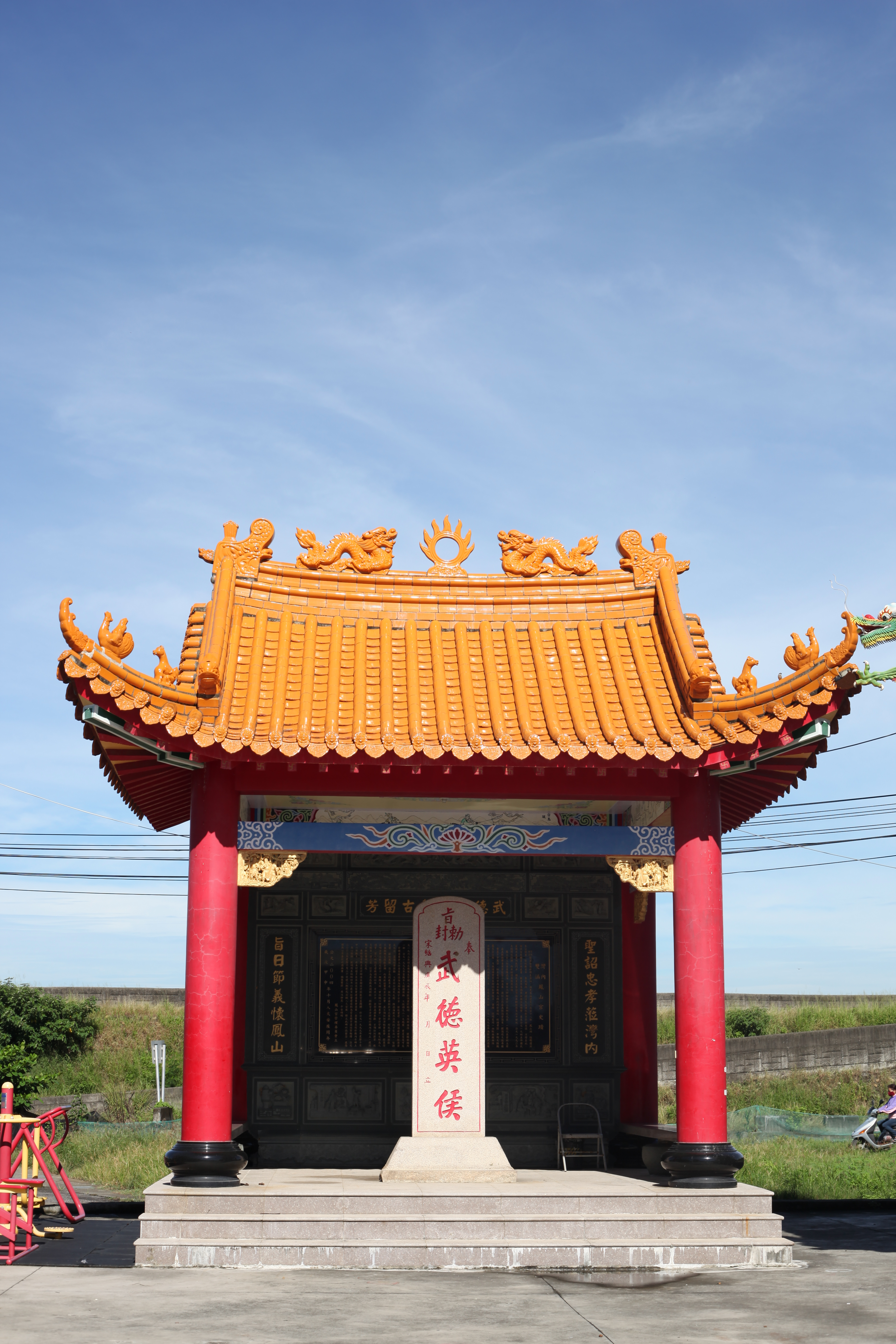 嘉義縣六腳鄉灣北村鳳山宮